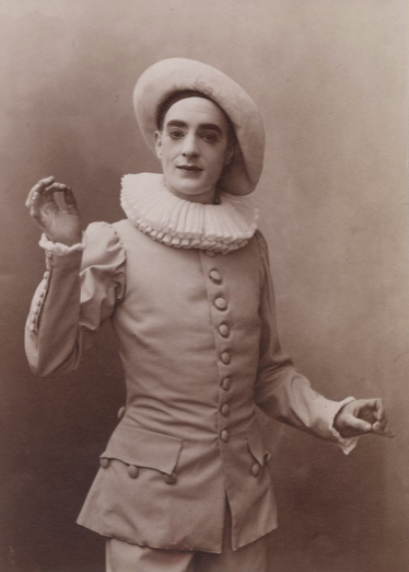 Jean Périer acteur